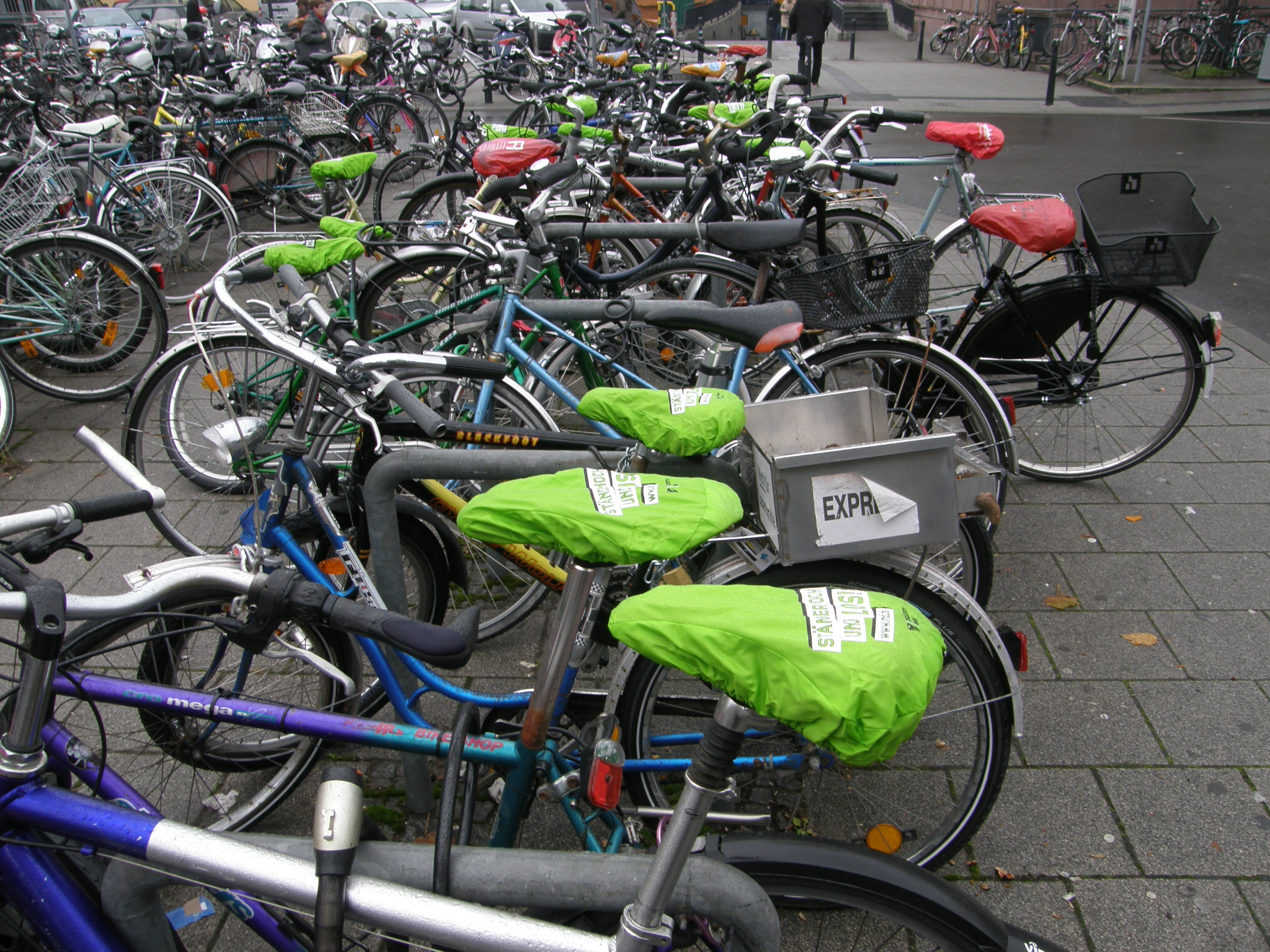 Massen-Werbung auf Fahrradsätteln. Von Firmen im Auftrag überzogene Farradsättel. (in Mannheim Hbf)